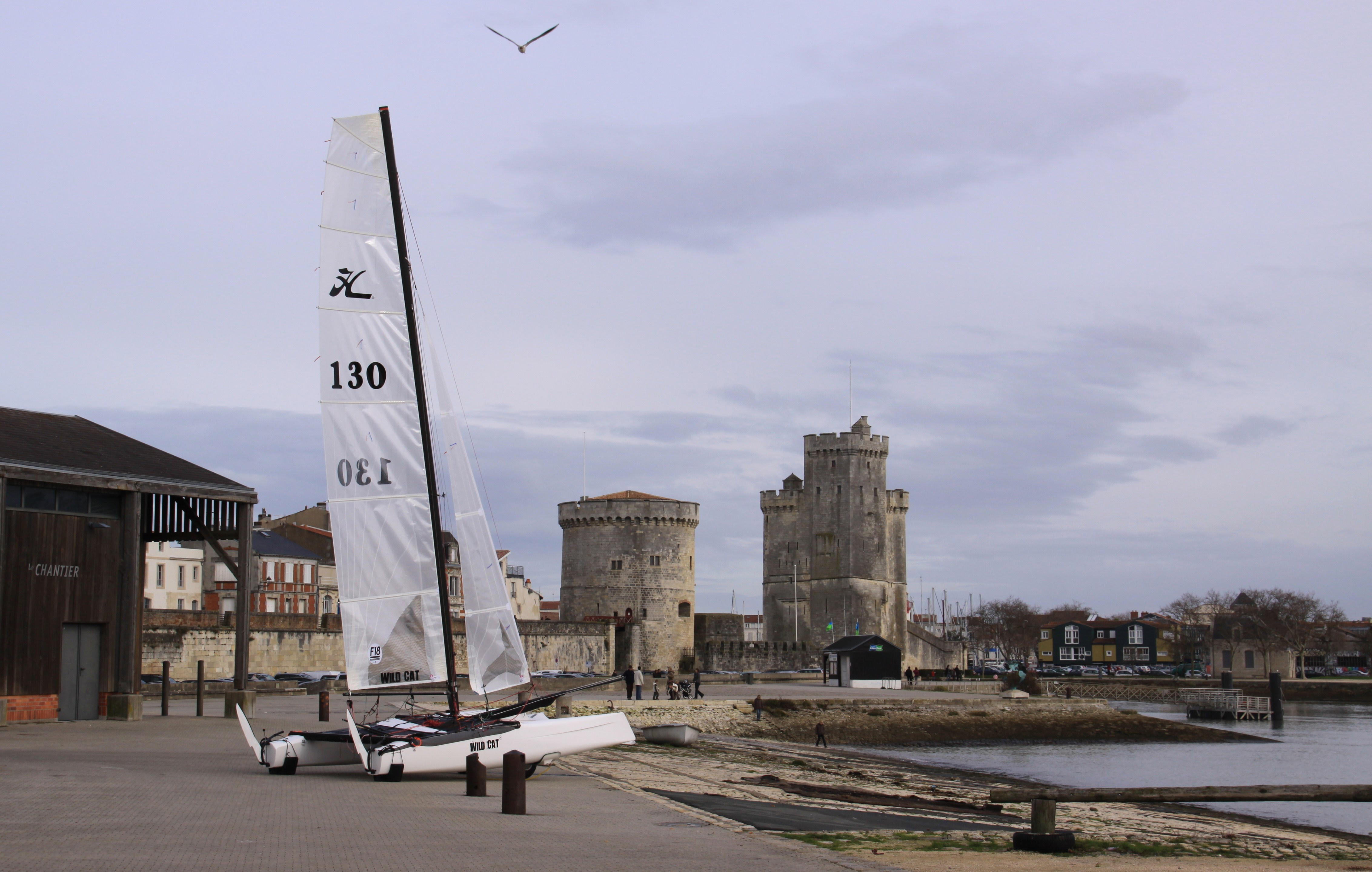 L' esplanade Saint-Jean d' Acre avec au premier plan l' ancienne cale de construction navale (dorénavent utilisée par les écoles de voile) et un catamaran de sport "Wild Cat" de la classe F 18. La Rochelle, Charente Maritime, France.